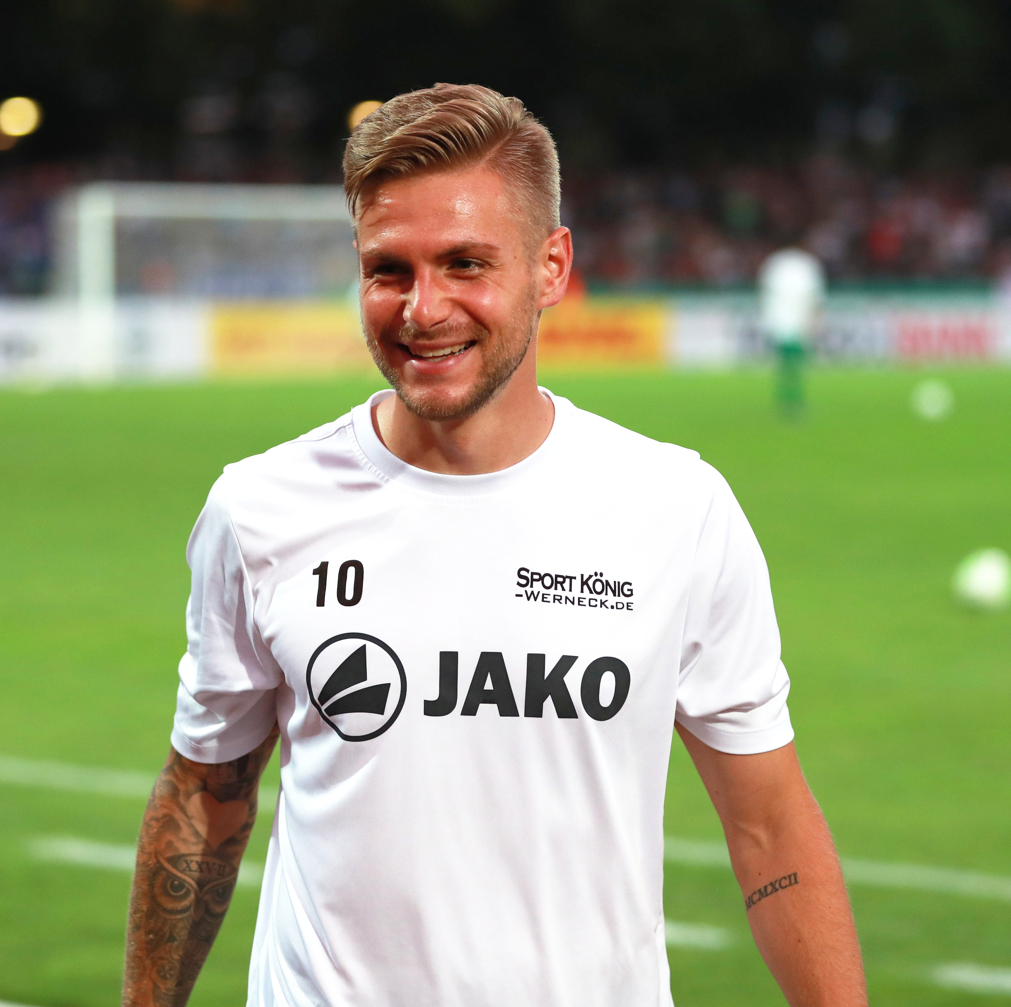 DFB-Pokal 2018/19, 1. Hauptrunde: 1. FC Schweinfurt 05 gegen FC Schalke 04 0:2 (0:1)